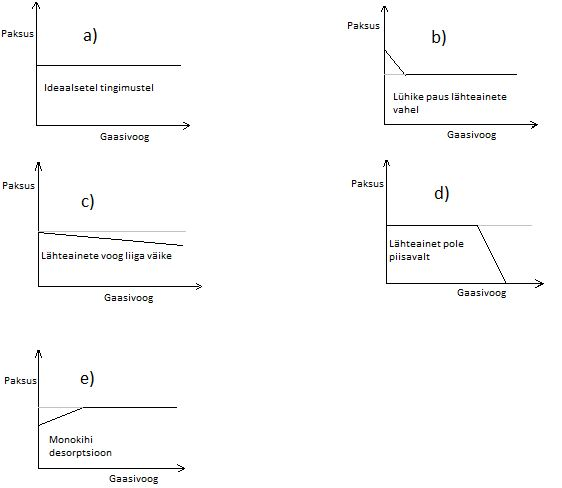 Kile paksuse sõltuvus gaasivoolust